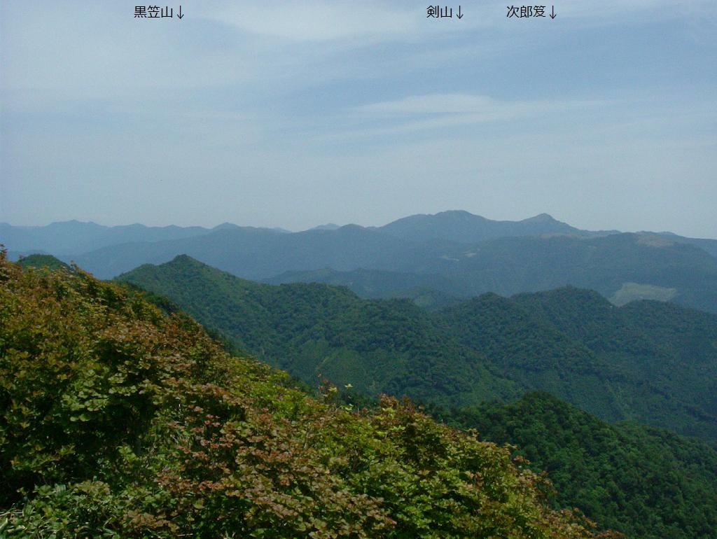 徳島県の三好市とつるぎ町の境界にある矢筈山から南東を臨む。